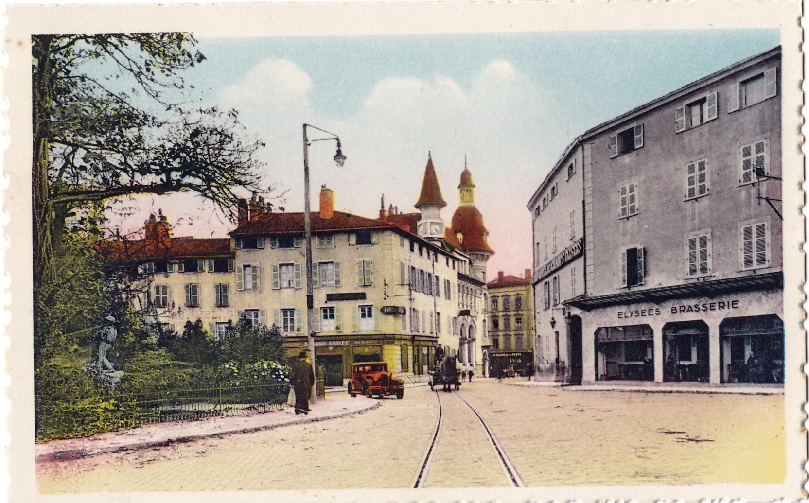 Carte postale ancienne éditée par Combier à Macon :Place de la barre et la Poste